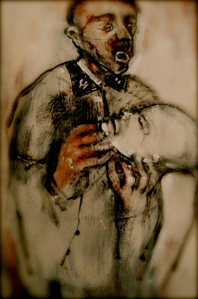 Gemälde des US-amerikanischen Künstlers Stefan Krikl; Titel: Portrait, one of several: "Dr.Horst Schumann with volunteer patient", Mischtechnik (Latex, Acryl) auf Grundplatte, Abmessungen: 28" x 44" (ca. 71 cm x ca. 112 cm), Entstehungsjahr: 1985. Die Arbeit gehört zu der Serie Doctors of Death, die 1985 an der Southwest Texas State University in San Marcos (Texas), USA, in einer Einzelausstellung von Krikls Arbeiten gezeigt wurde. Kurator war der damalige Leiter der Kunstgalerie der Universität, Mark Todd. Ergänzende Angaben von Stefan Krikl (Ausszug): „SS-Sturmbannführer und Oberstabsarzt Dr. Horst Schumann“. (Urheberrechtliche Hinweise: Stefan Krikl ist Schöpfer des Gemäldes, das von ihm selbst fotografiert und unter eigenem Namen sowie mit der CreativeCommons-Lizenz CC-BY auf der Flickr-Plattform veröffentlicht wurde.)